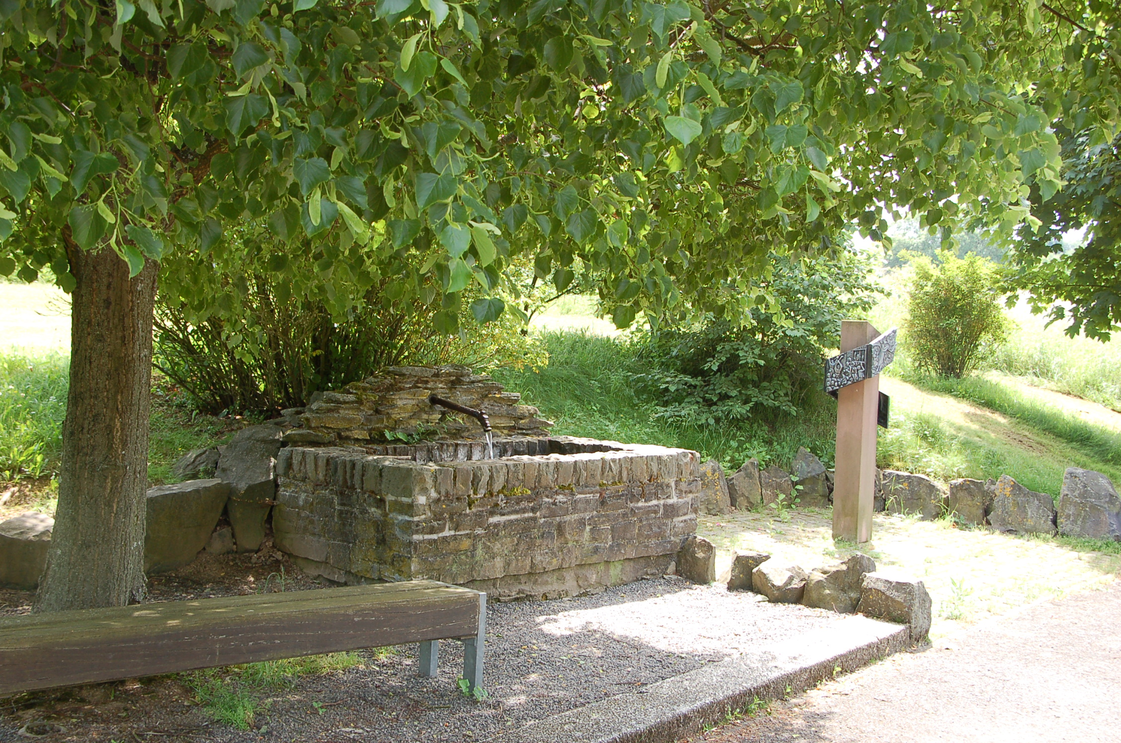 Pferdsfeld: Dorfbrunnen und Paul-Schneider-Stele